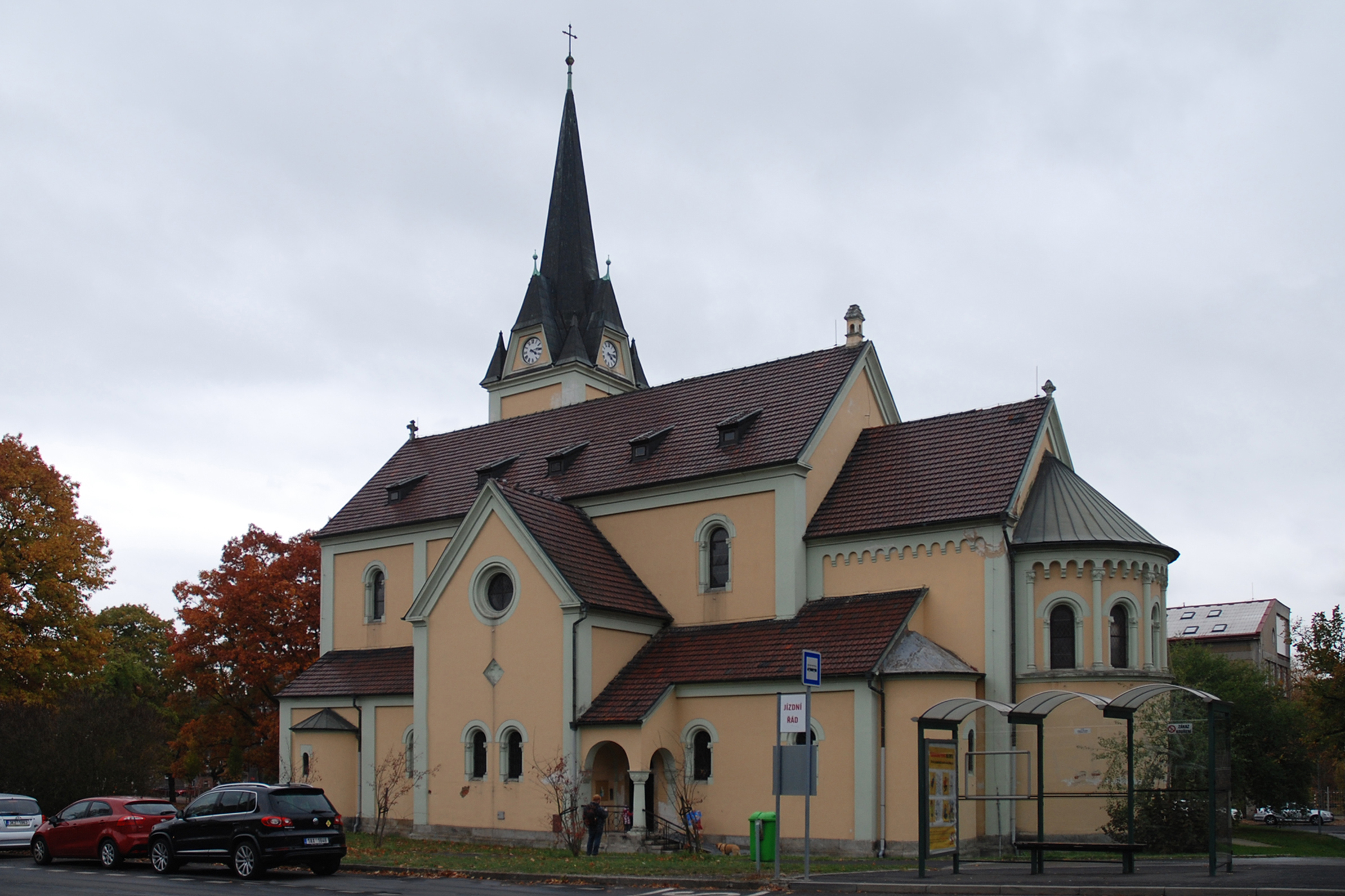 Kostel sv. Kříže na náměstí 17. listopadu, Karlovy Vary-Rybáře